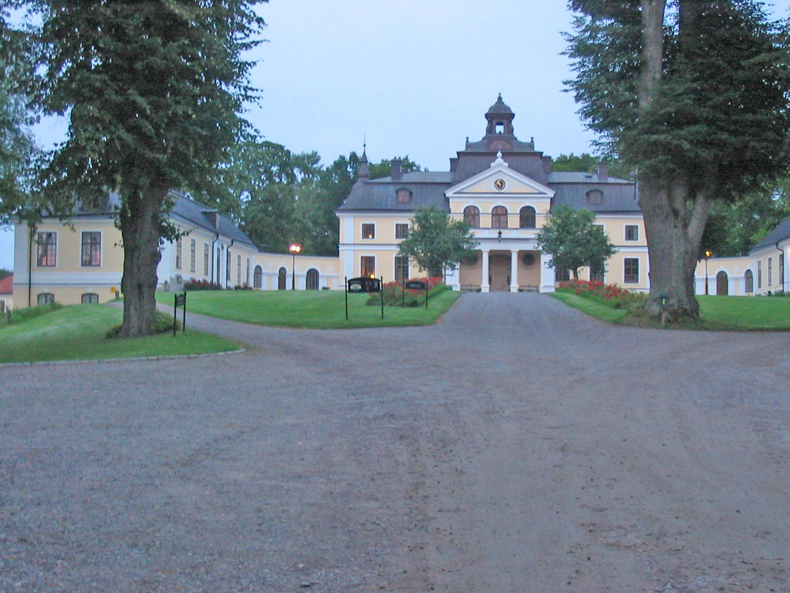 Fotat av turist, (Tompen0000) 2004.